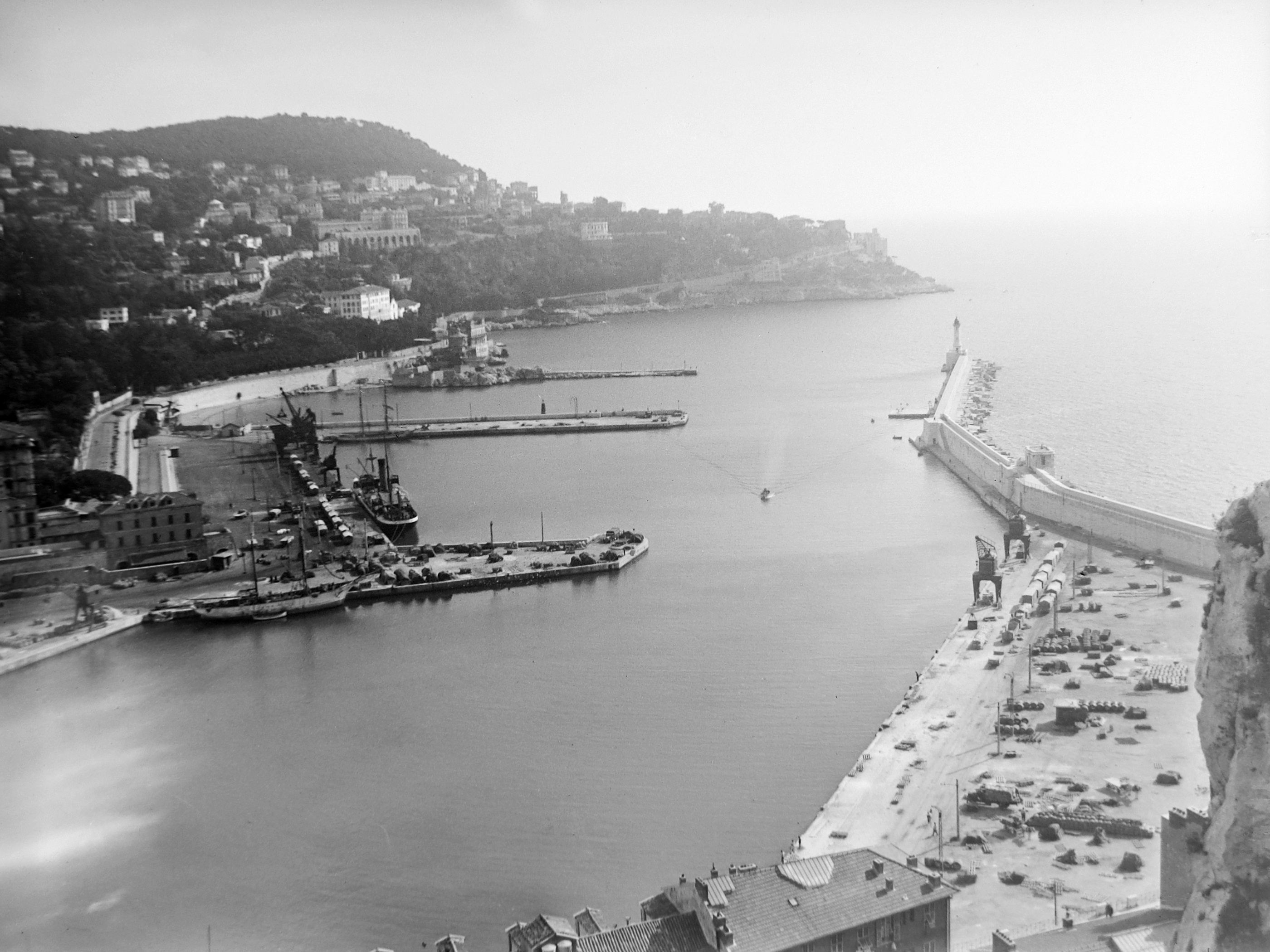 Le port de Nice